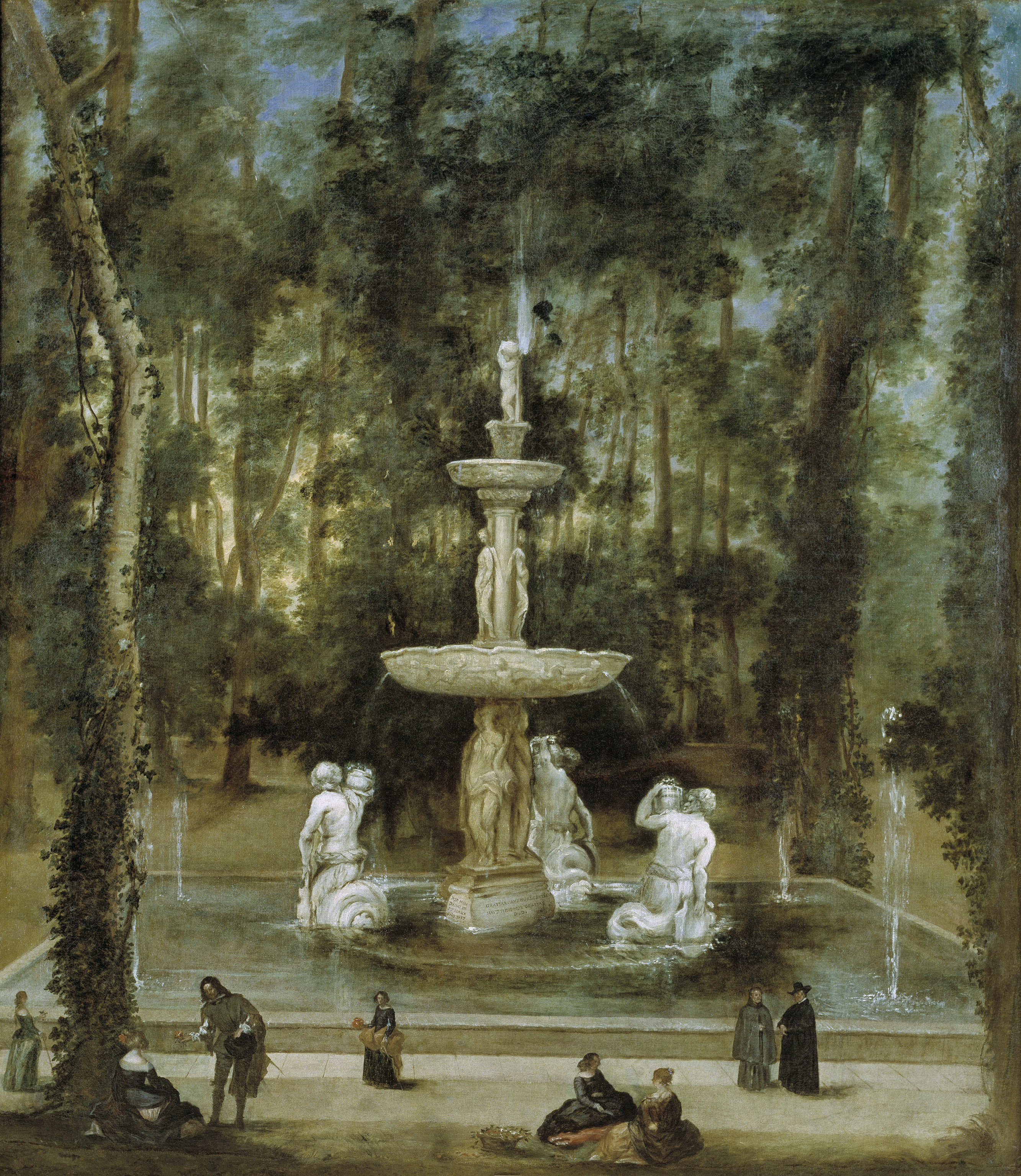 La obra representa la Fuente de los Tritones, que está siturada en los jardines del Campo del Moro del Palacio Real de Madrid y que anteriormente estuvo situada en los jardines del Palacio Real de Aranjuez.